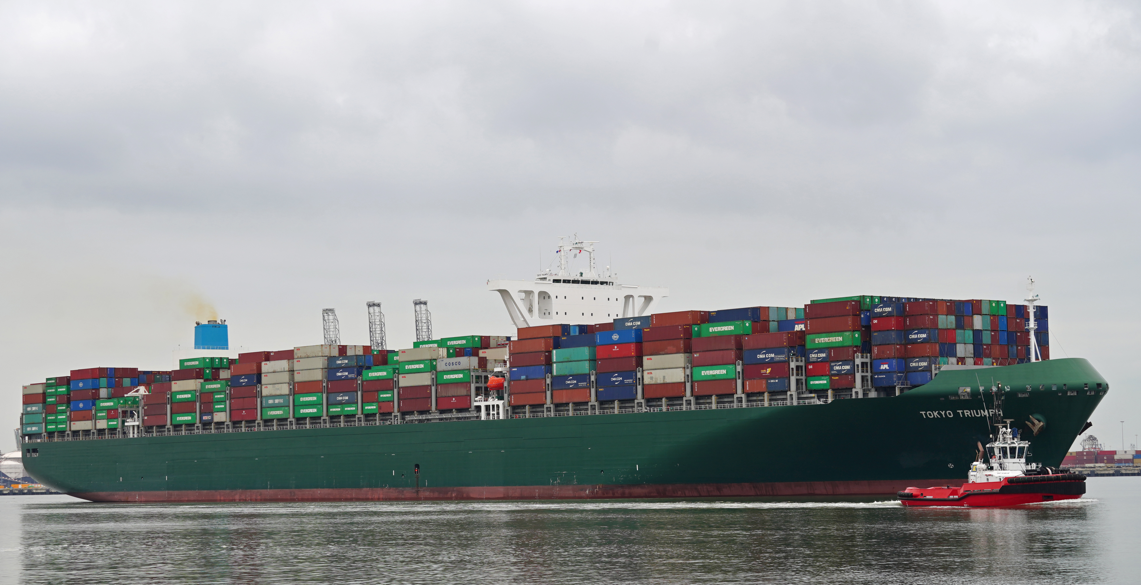 Beerkanaal 6-1-2019